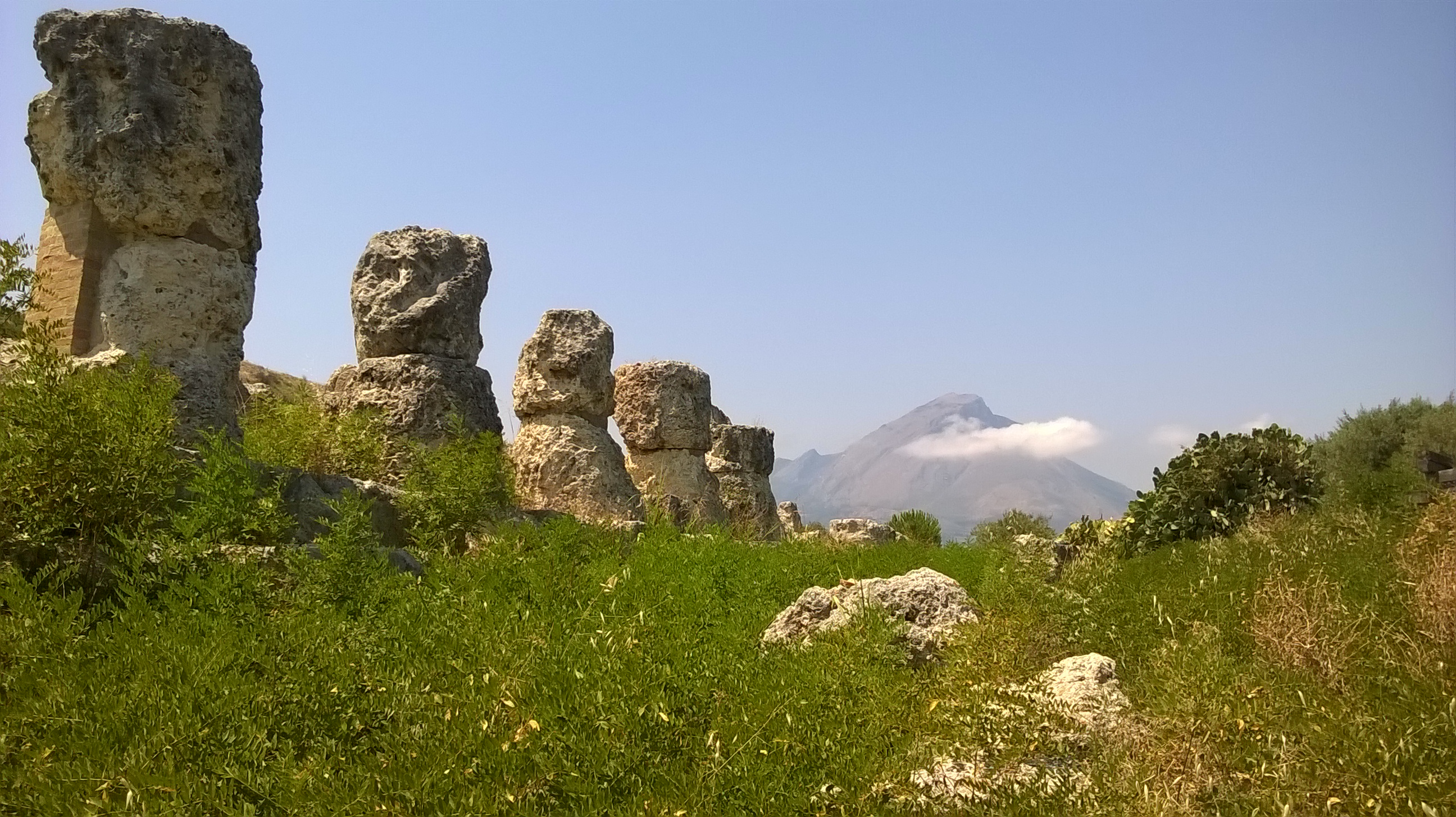 Himera - Sicilia